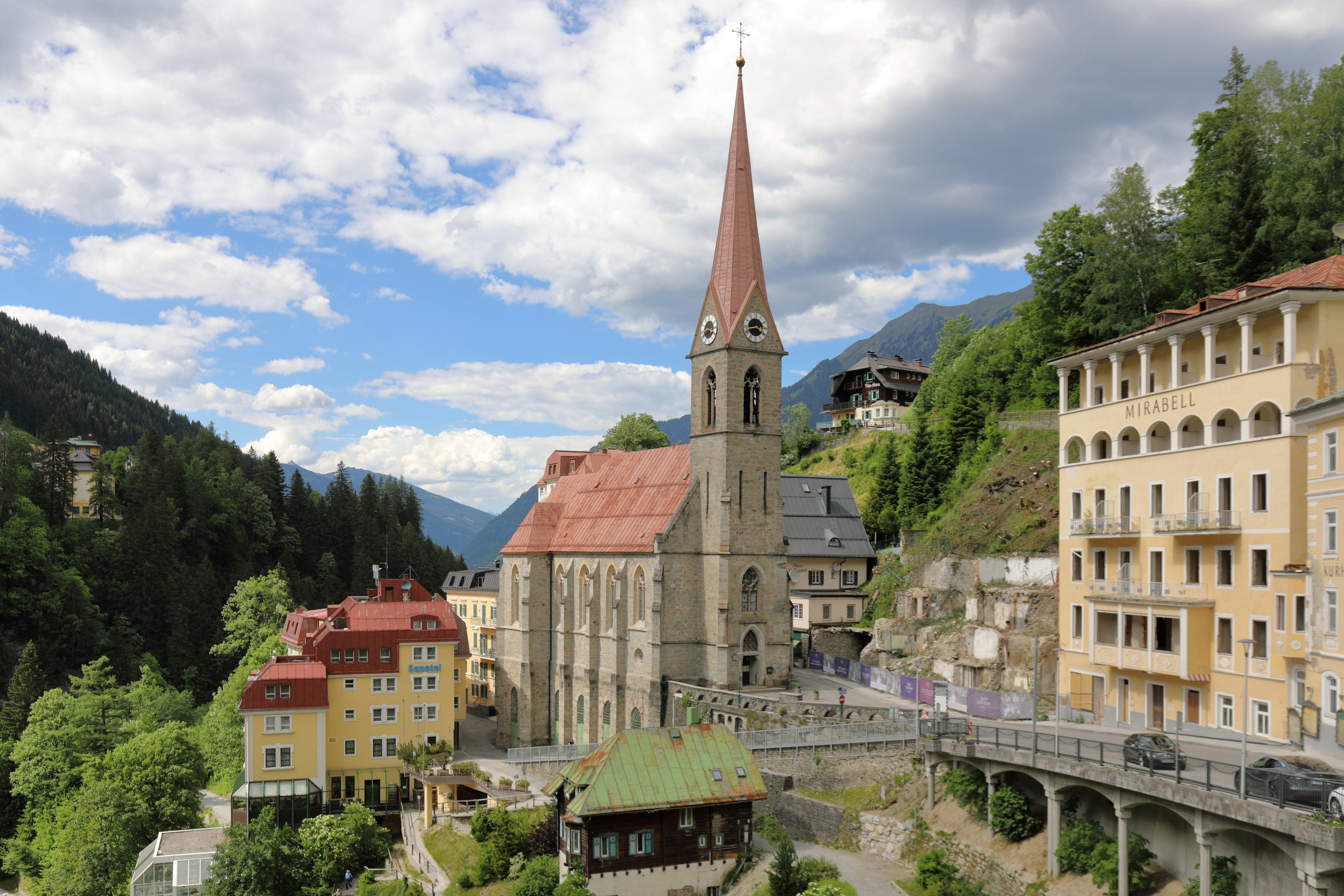 Südansicht der röm.-kath. Pfarrkirche hl. Primus und hl. Felizian in der Salzburger Gemeinde Bad Gastein.Die neogotische Kirche wurde anstelle einer baufälligen Vorgängerkirche ab 1866 (Grundsteinlegung am 14. Februar) errichtet und am 27. November 1876 feierlich geweiht. Den Plan für die einschiffige, nach Norden ausgerichtete Kirche mit Südturm lieferte der k.k. Bezirksingenieur Pieschel. Den Bau führte der Salzburger Baumeister Jacob Ceconi aus. Der Dombaumeister Friedrich von Schmidt lieferte die Zeichnungen für die Einzelheiten und die Einrichtungen.